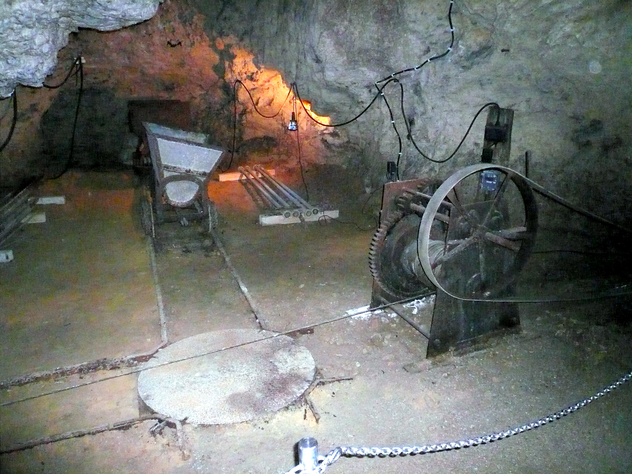 Teufelshöhle bei Pottenstein, Ausstellungsstücke